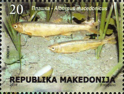 Alburnus macedonicus